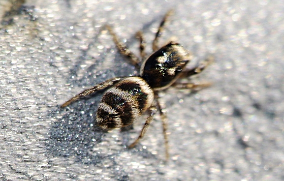 Araña saltadora Salticus propinquus